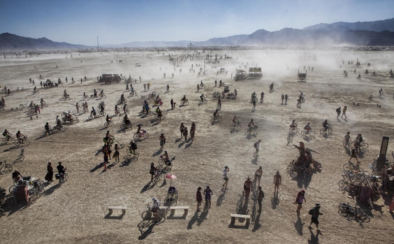 Burning man 2010